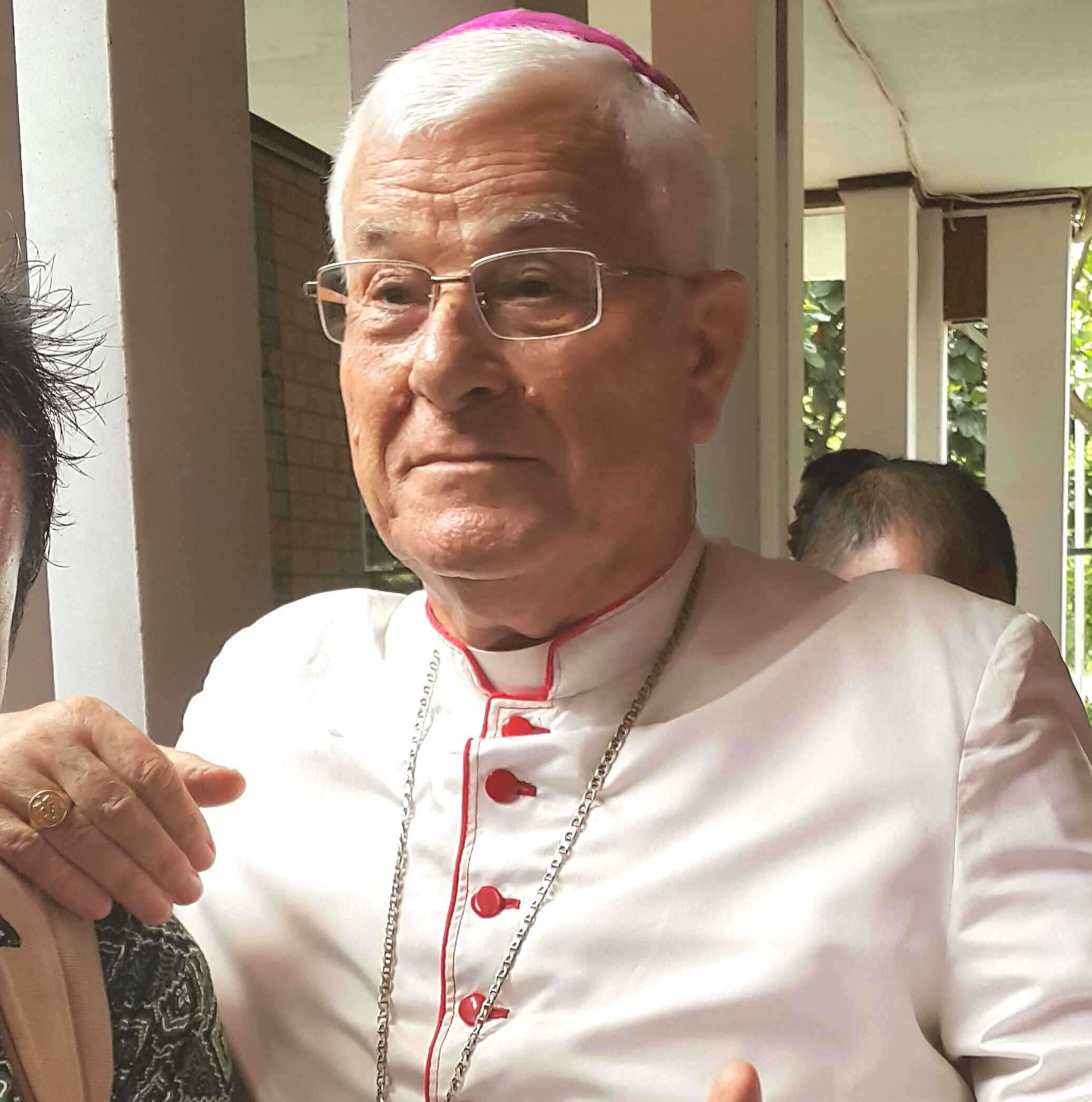 Mgr Giulio Mencuccini, Uskup Sanggau